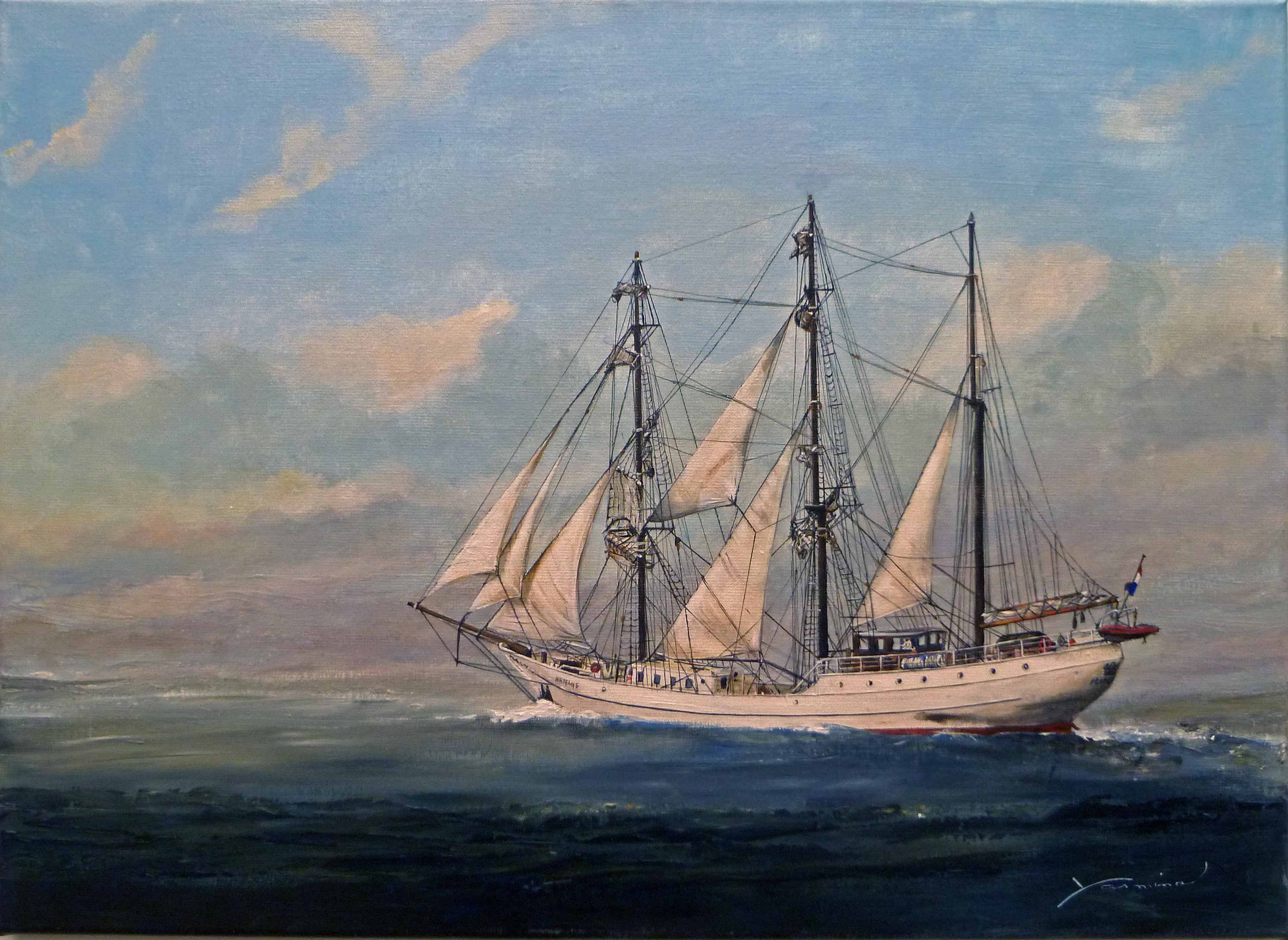 Artistieke impressie door de Belgische kunstschilderes Yasmina van de driemaster "Artemis" (1926), oorspronkelijk een walvisjager, nu een plezierboot